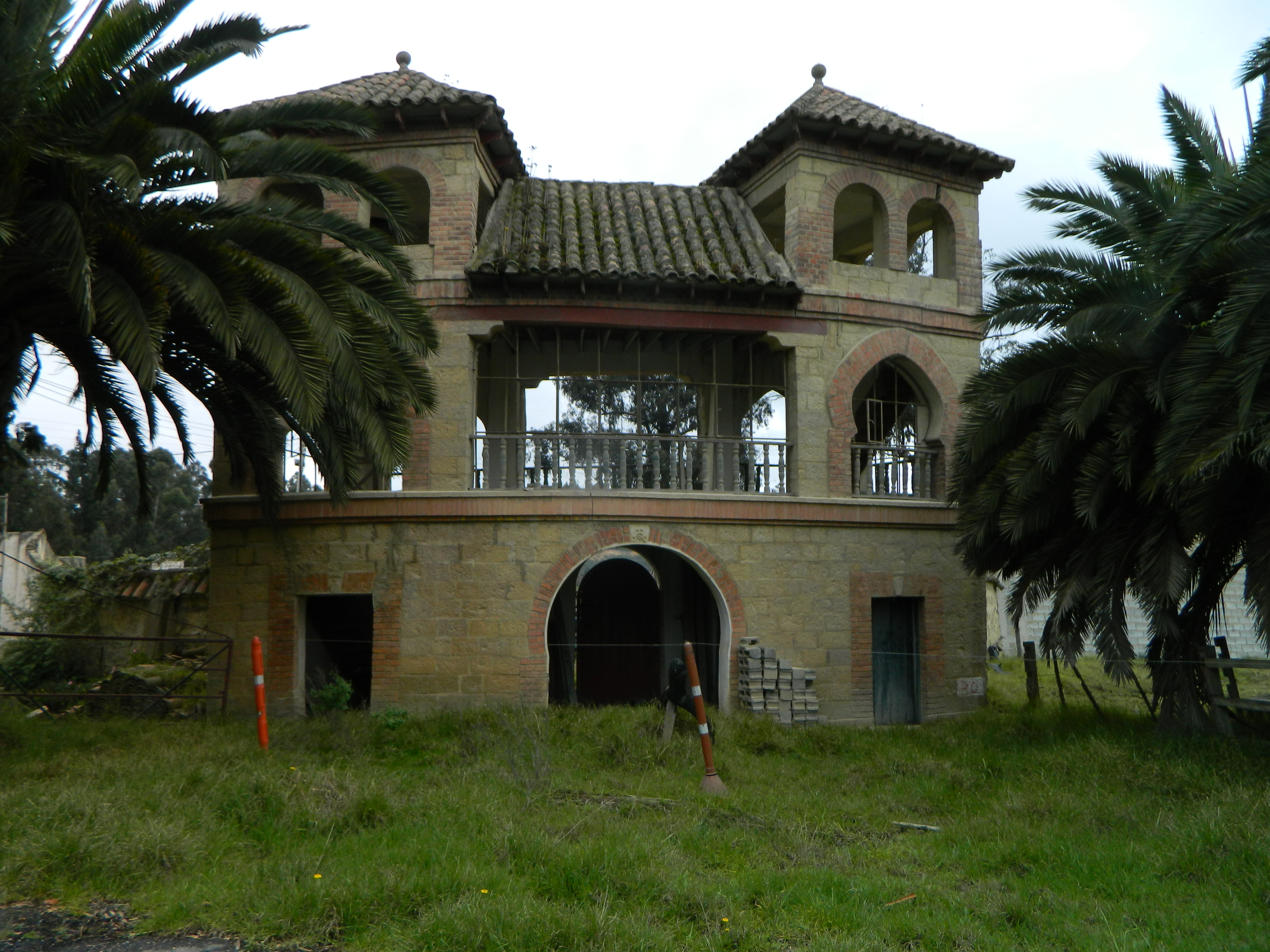 Fotografía del frente de la hacienda Vista Hermosa